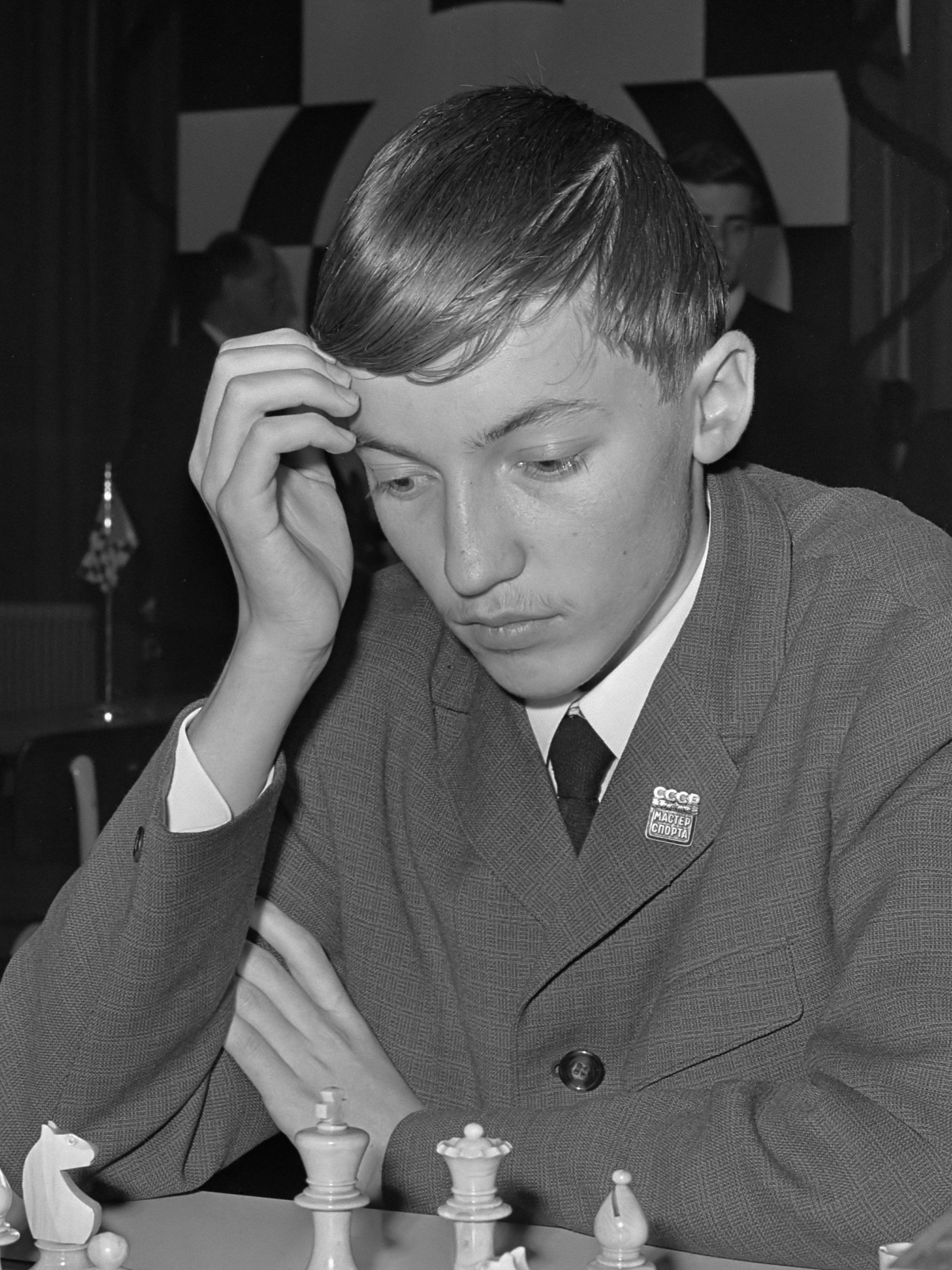 Zesde Niemeyer Jeugdschaaktoernooi te Groningen. Antoni Karpov (Rusland) 27 december 1967